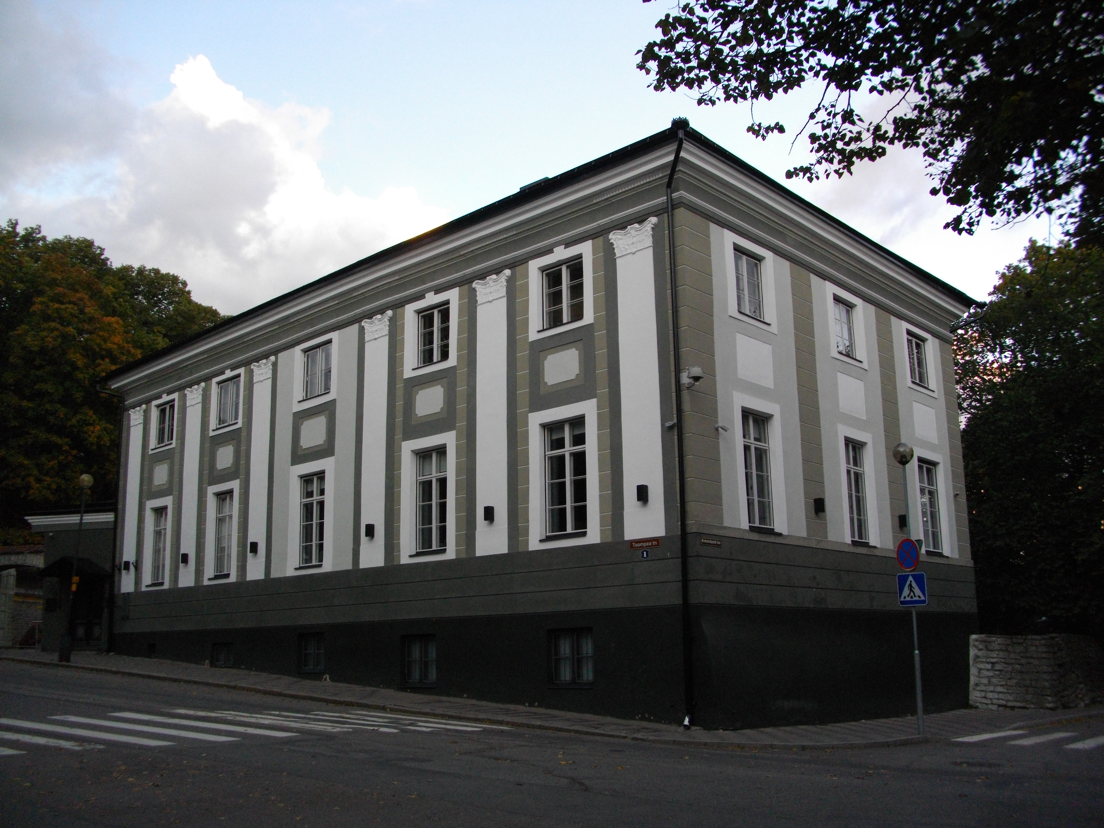 Vabariigi Valimiskomisjon